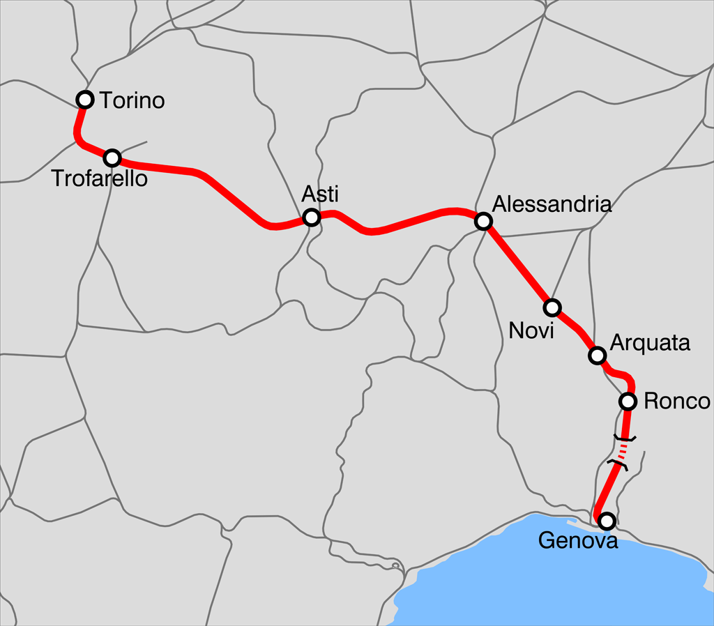 Mappa della ferrovia Torino-Genova